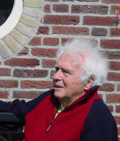 Gerard Peter Hoefnagels.